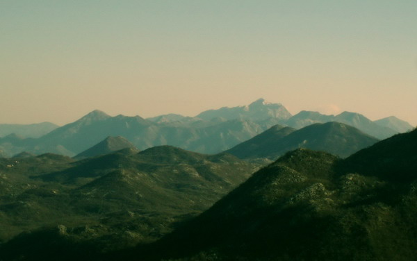 Rumija Mountain.